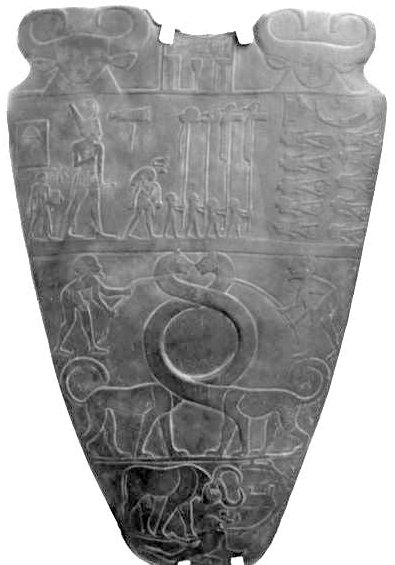 In tweeën gedeeld om meer details te laten zien.